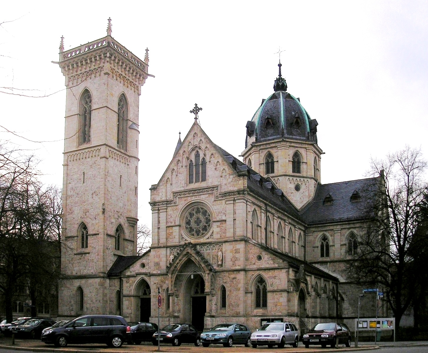 Weimar, kath. Pfarrkirche Herz Jesu